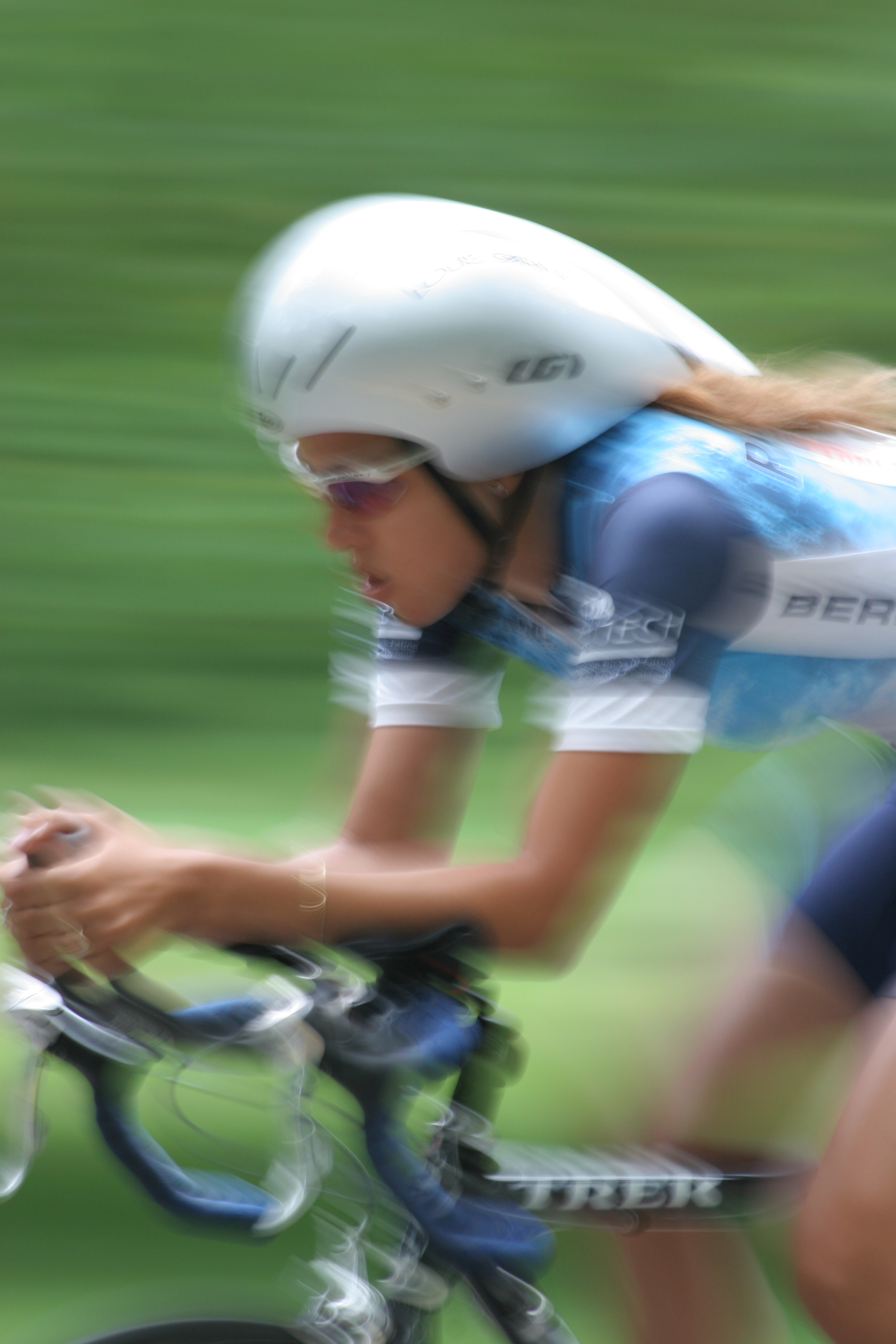 Amateur female time trialist